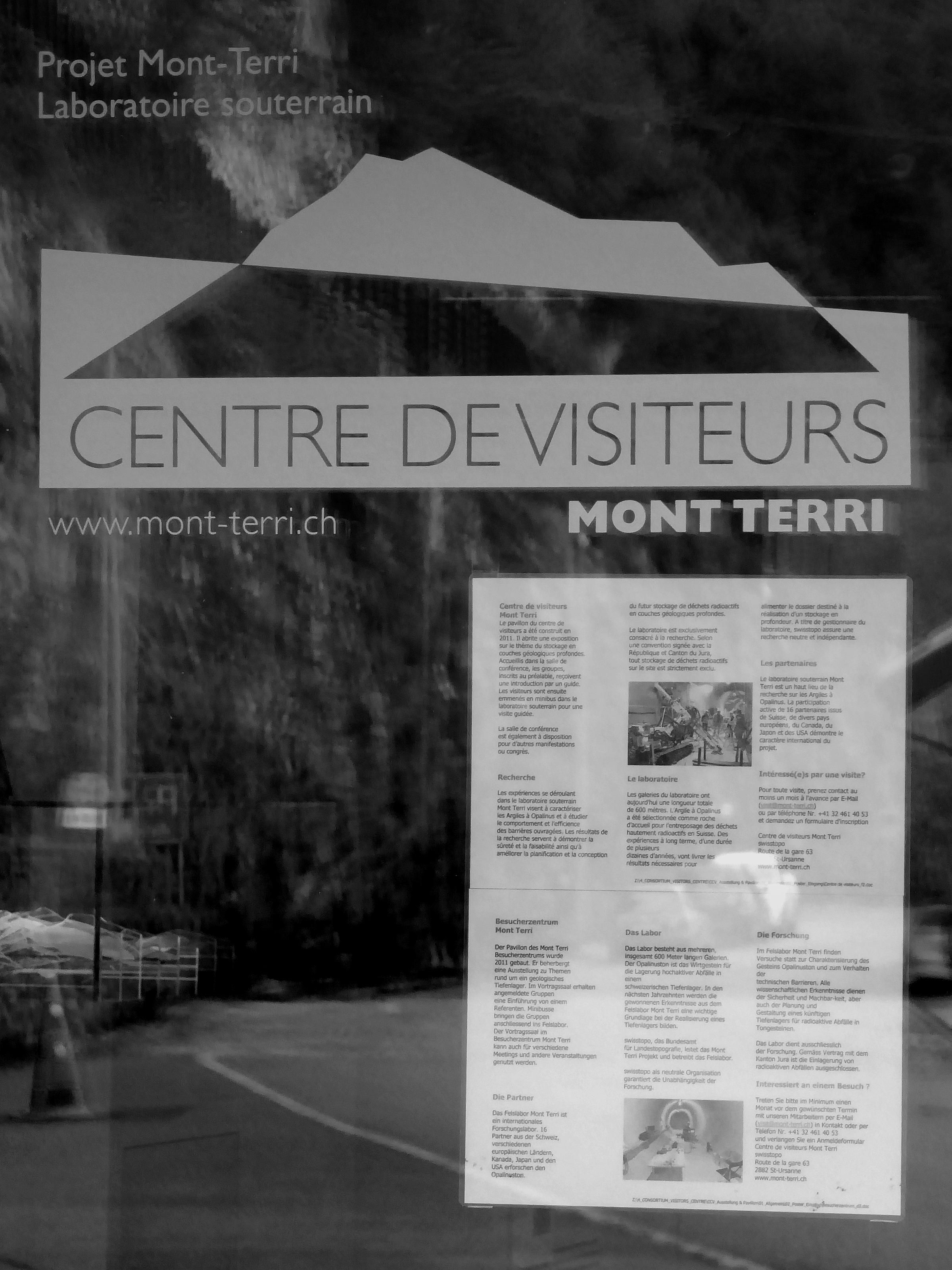 Felslabor Mont Terri, Route de la Gare, 2882 Saint-Ursanne